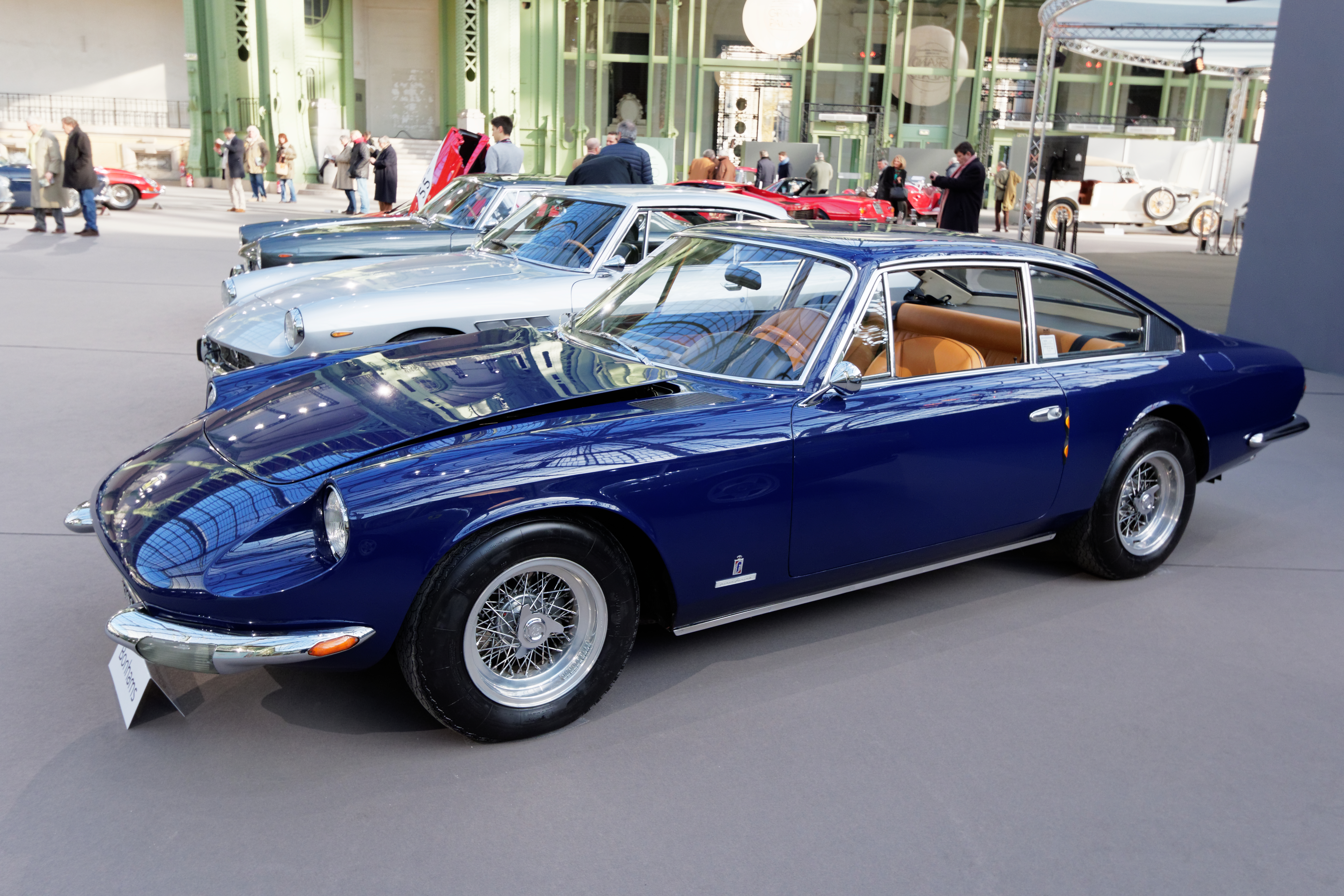 Un des véhicules présenté lors de la vente aux enchères Bonhams 2015 au Grand Palais de Paris.